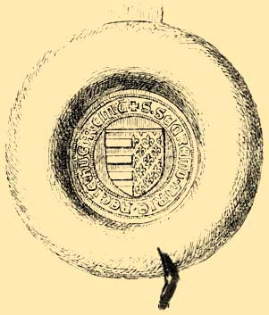 Marie Uherská